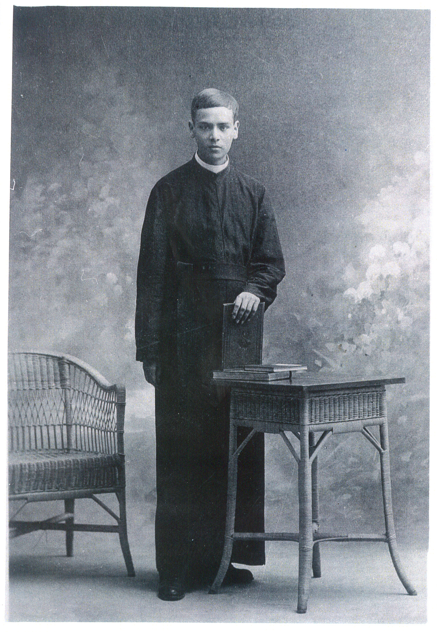 Fr. Sáenz as a young semminarist